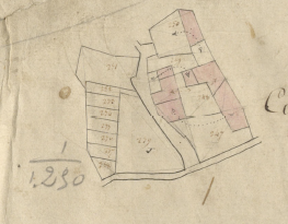 Callastre en el Cadastre Napoleònic del 1812 (Arxius Departamentals dels Pirineus Orientals)